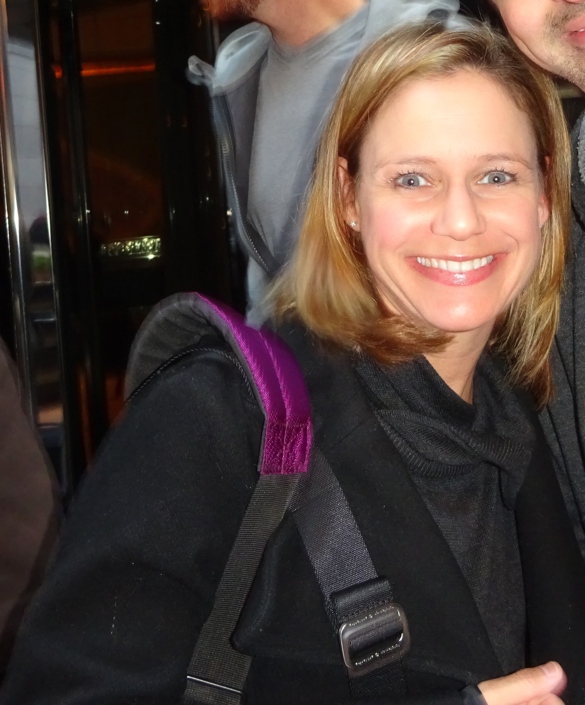 Kimmy Gibbler herself! 2/28/2016